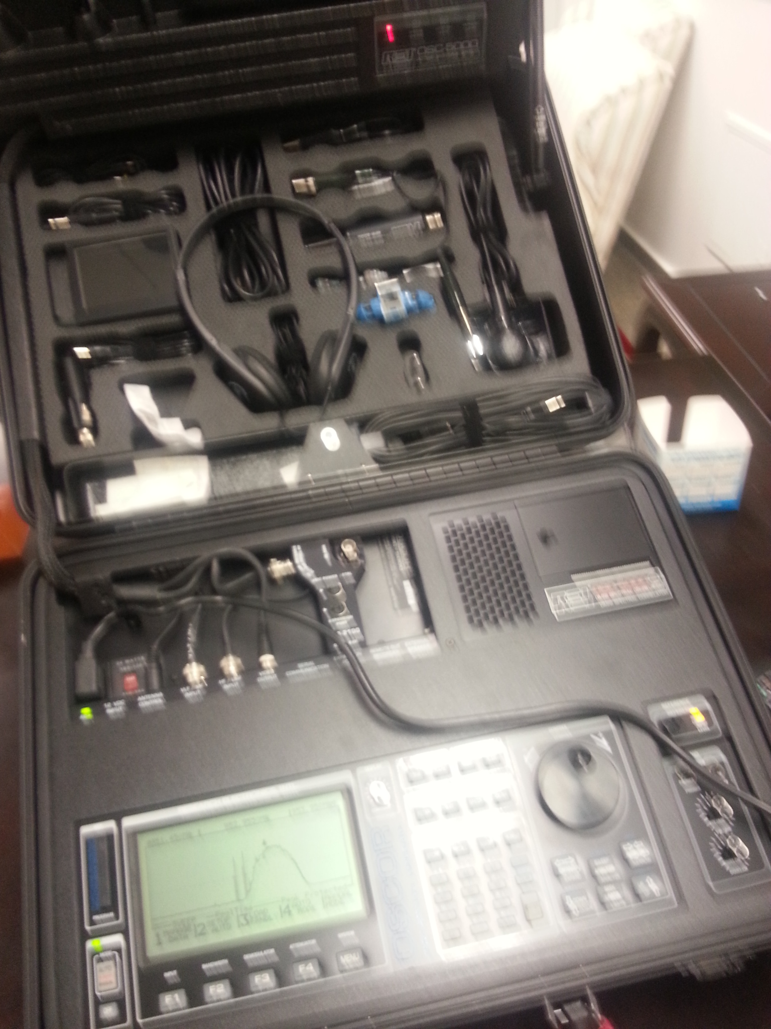 Correlacionador Escpectral OSCOR 5000